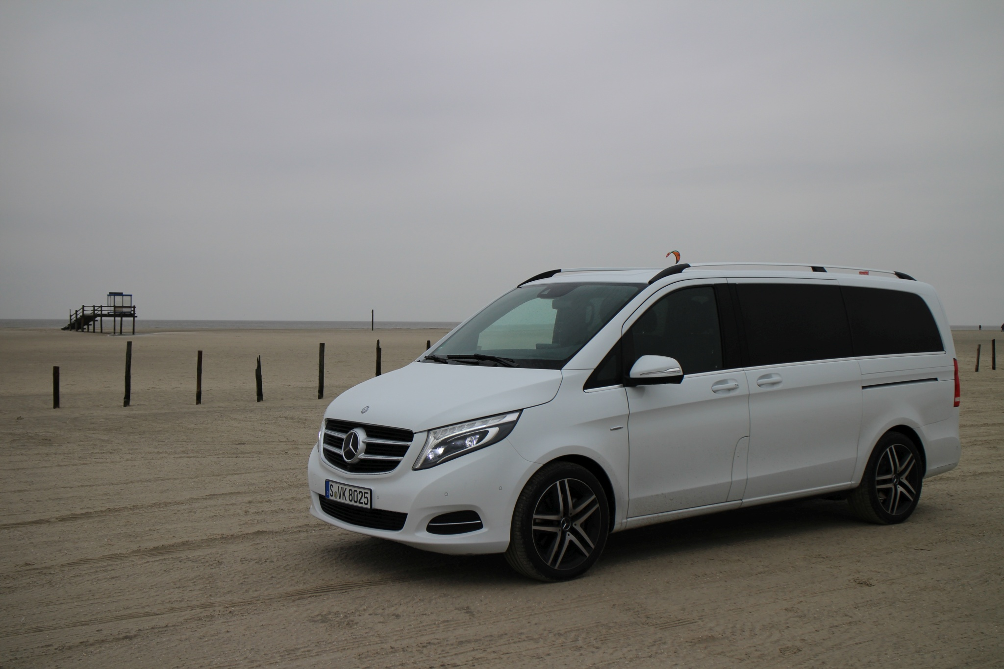 V-Klasse April 2014 Ausstattungslinie: Avantgarde Motor: V 250 Bluetec, 140 KW (190 PS), Diesel